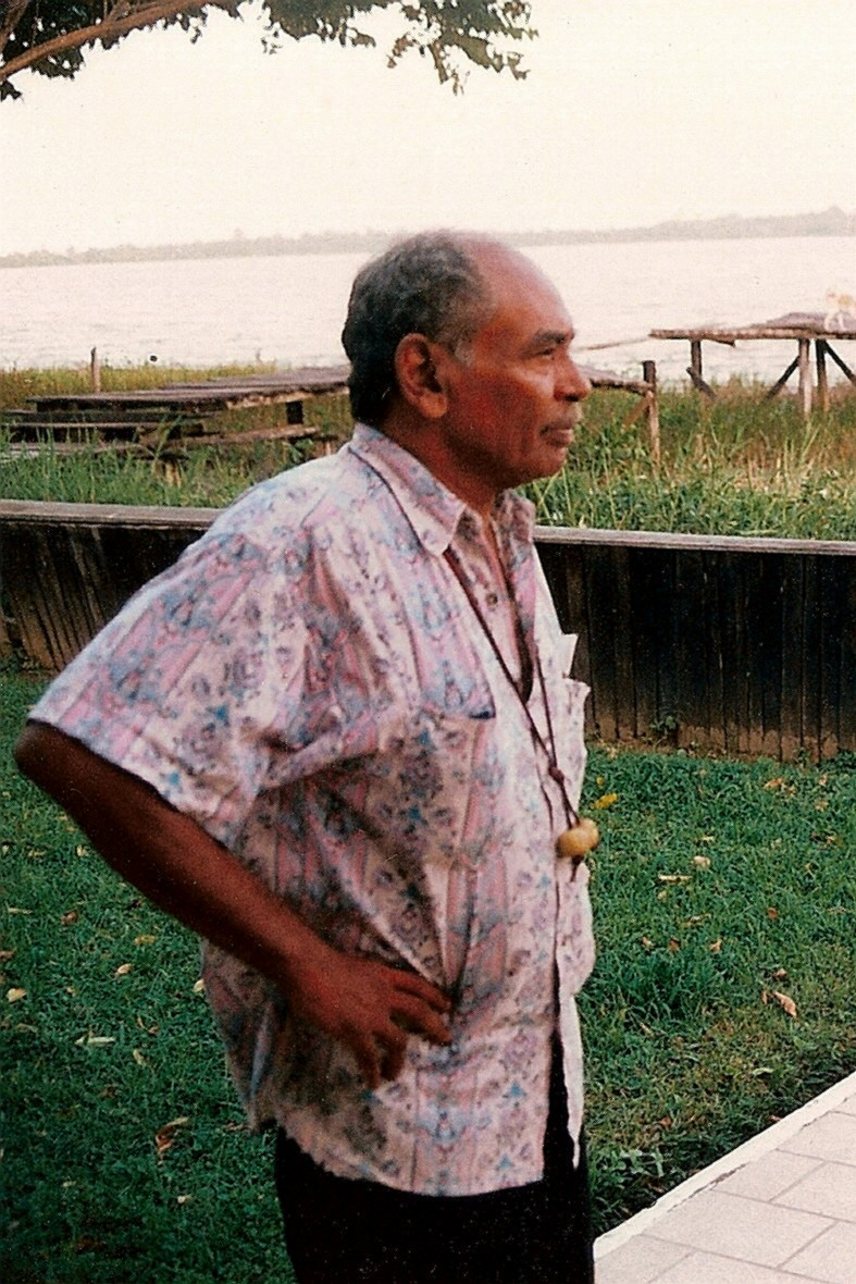 Erwin de Vries, Surinaams kunstenaar. Eigen opname, ca. 1995.